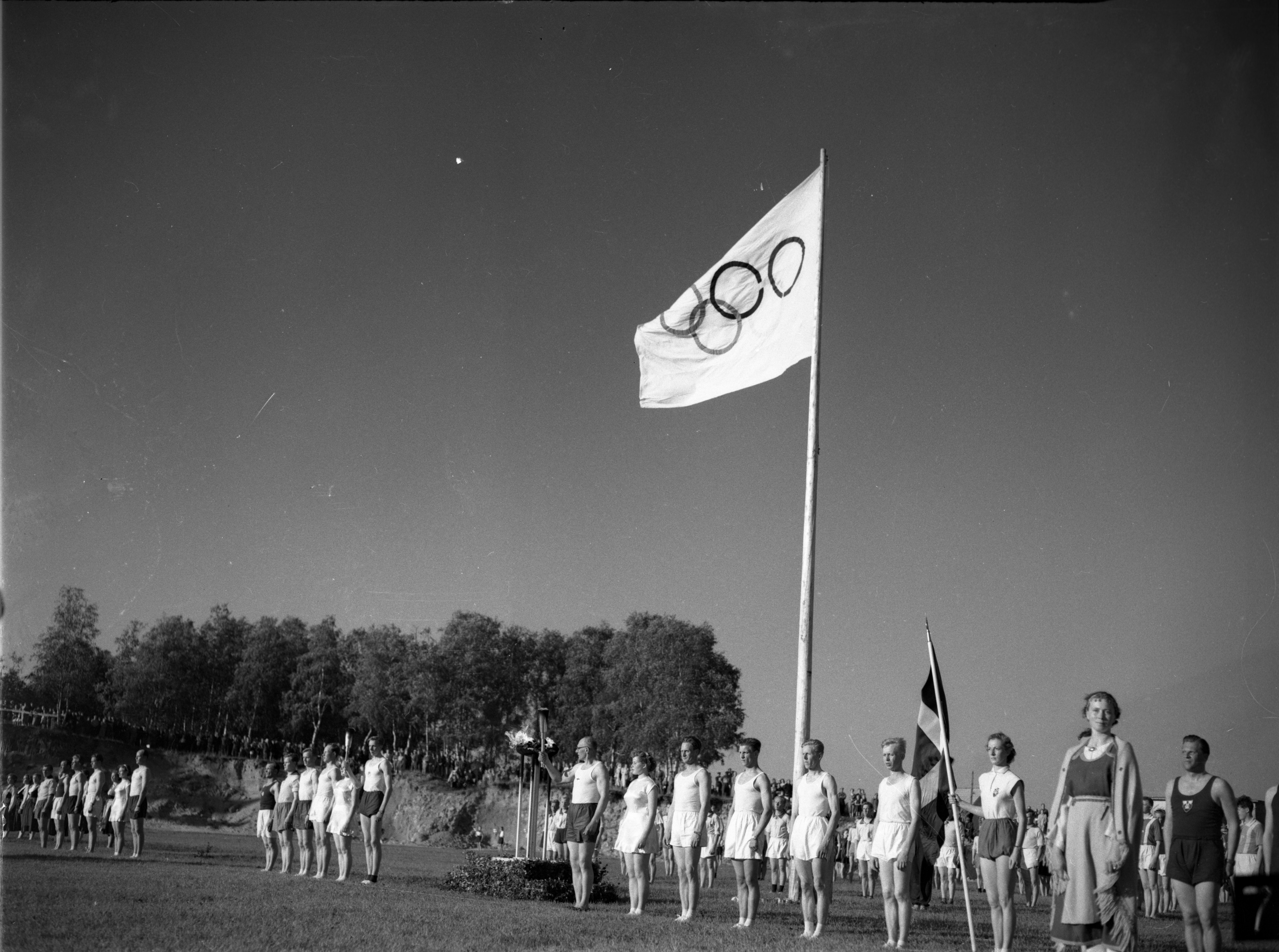 Soihtujuhla Torniossa 8.7.1952. Juhlassa yhdistettiin Pallastunturin ja Kreikan tulet. Kuvassa keskellä soihdunkantajat Tauno Kontio ja Ville Pörhölä.